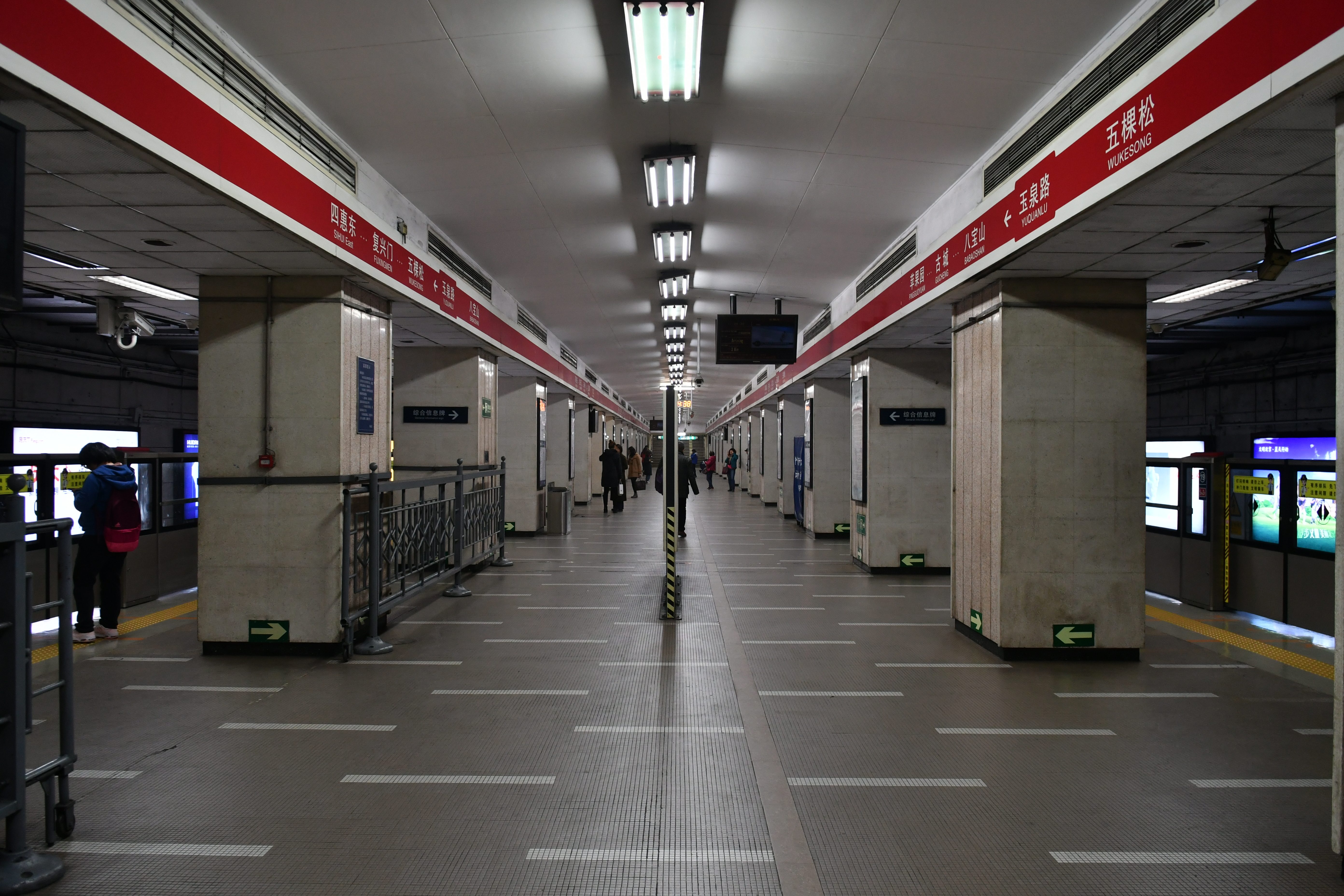 北京地铁1号线玉泉路站岛式站台。站台加装半高式安全门。